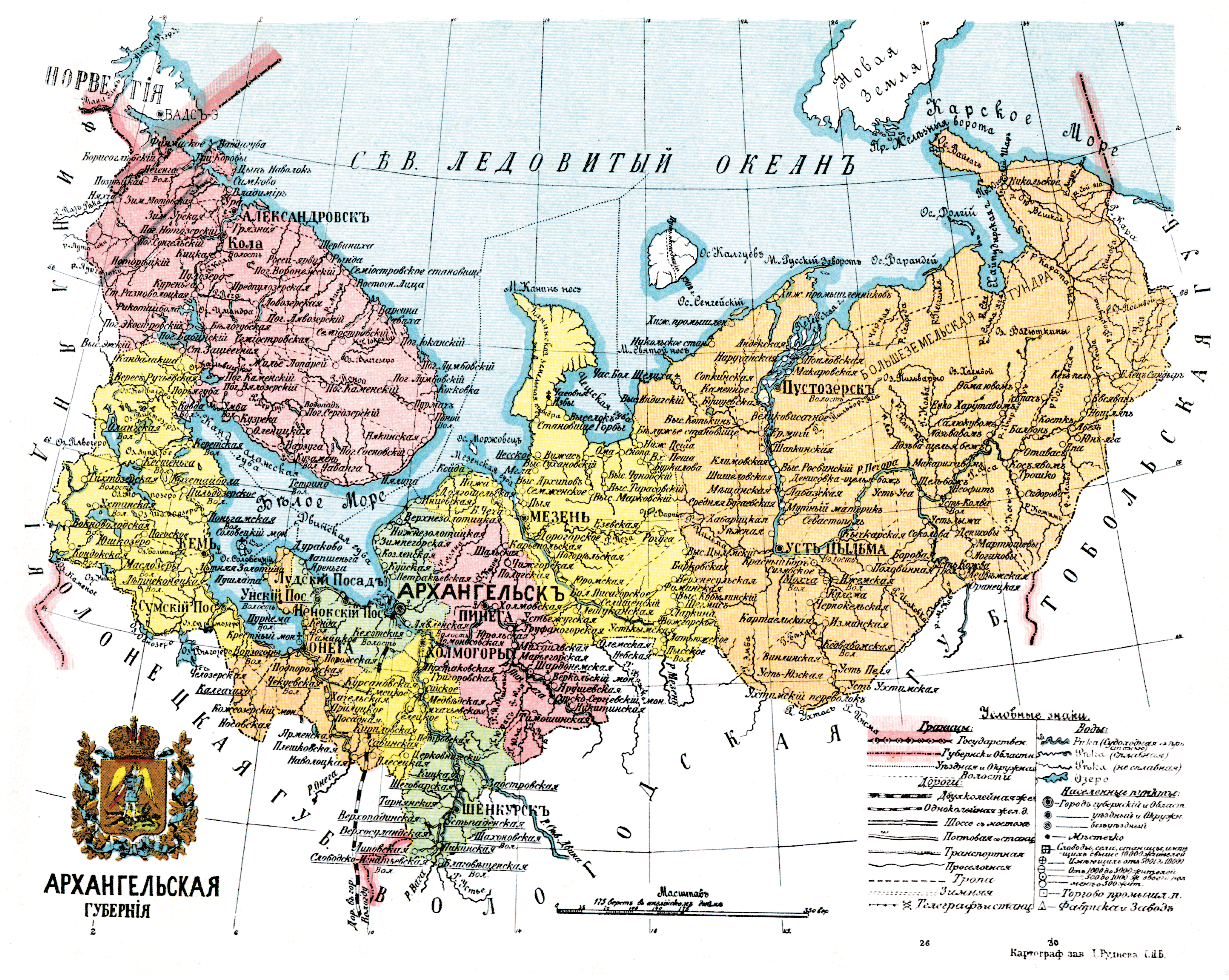 Карта Архангельской губернии, 1913 год